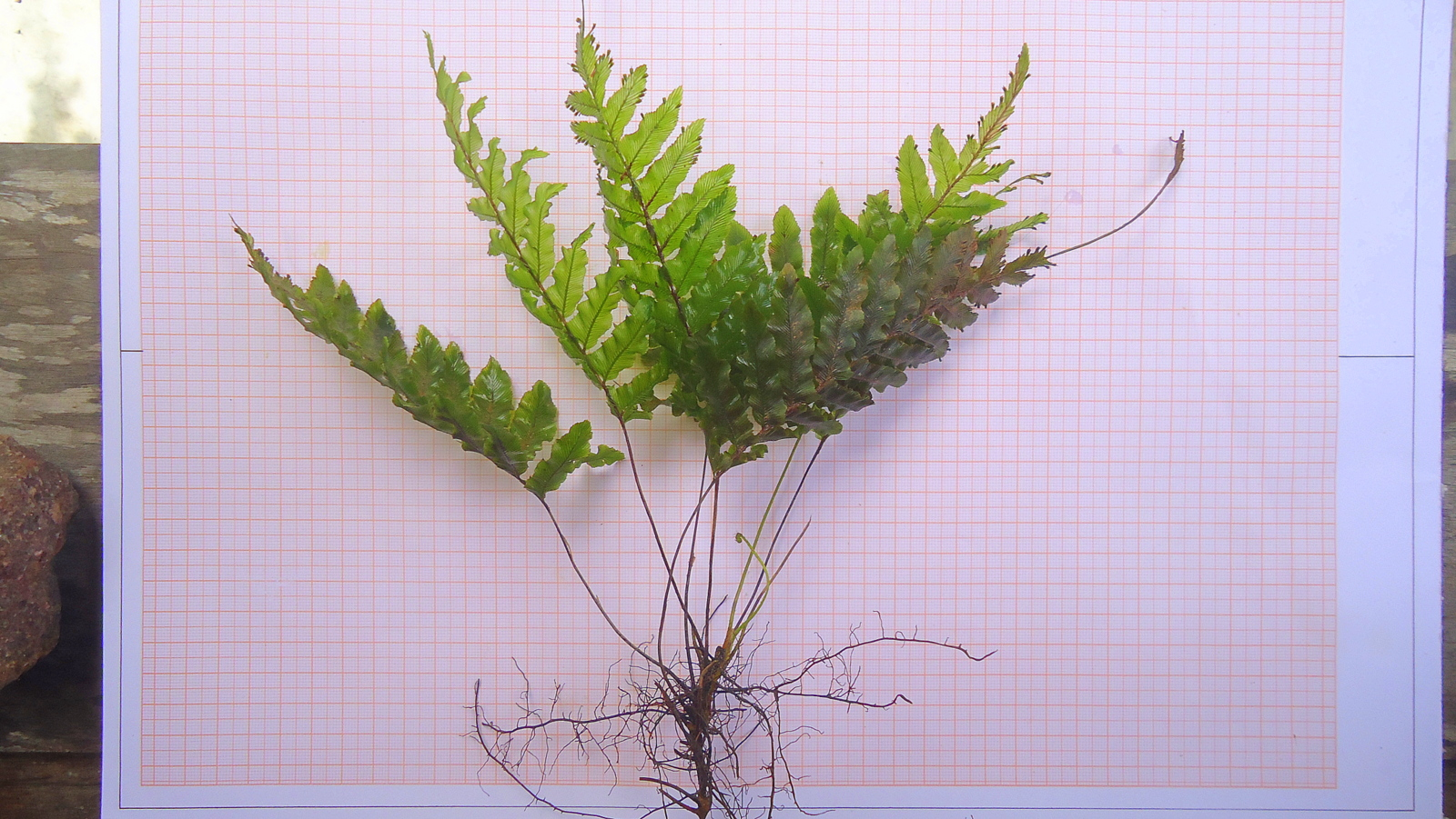 Trichomanes hostmannianum (Klotzsch) Kunze